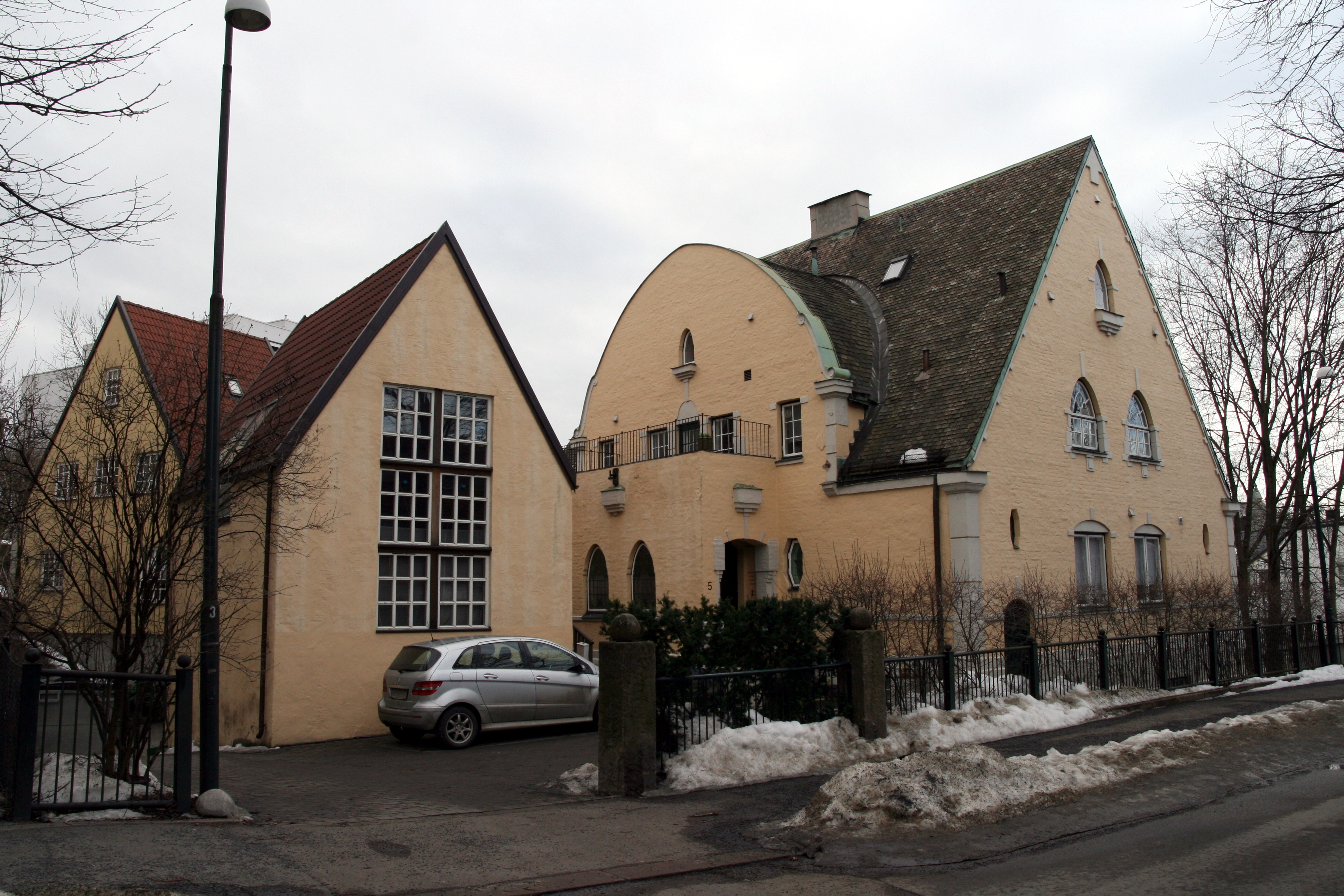 Frøyas gate 5 på Skarpsno i Oslo.